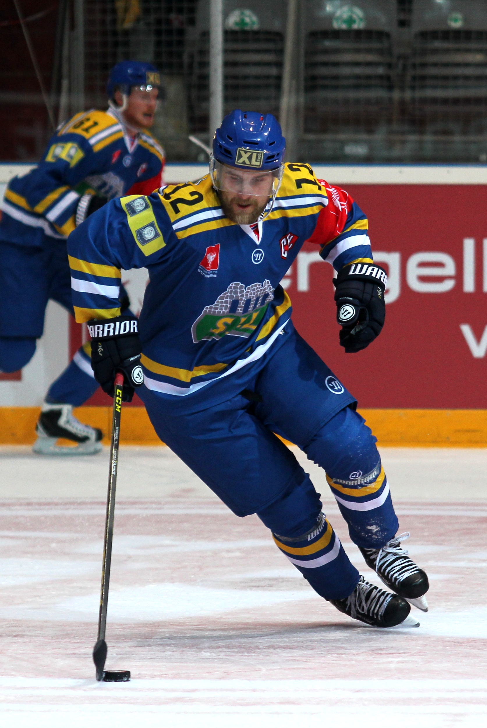 Jacob Berglund (H 12).